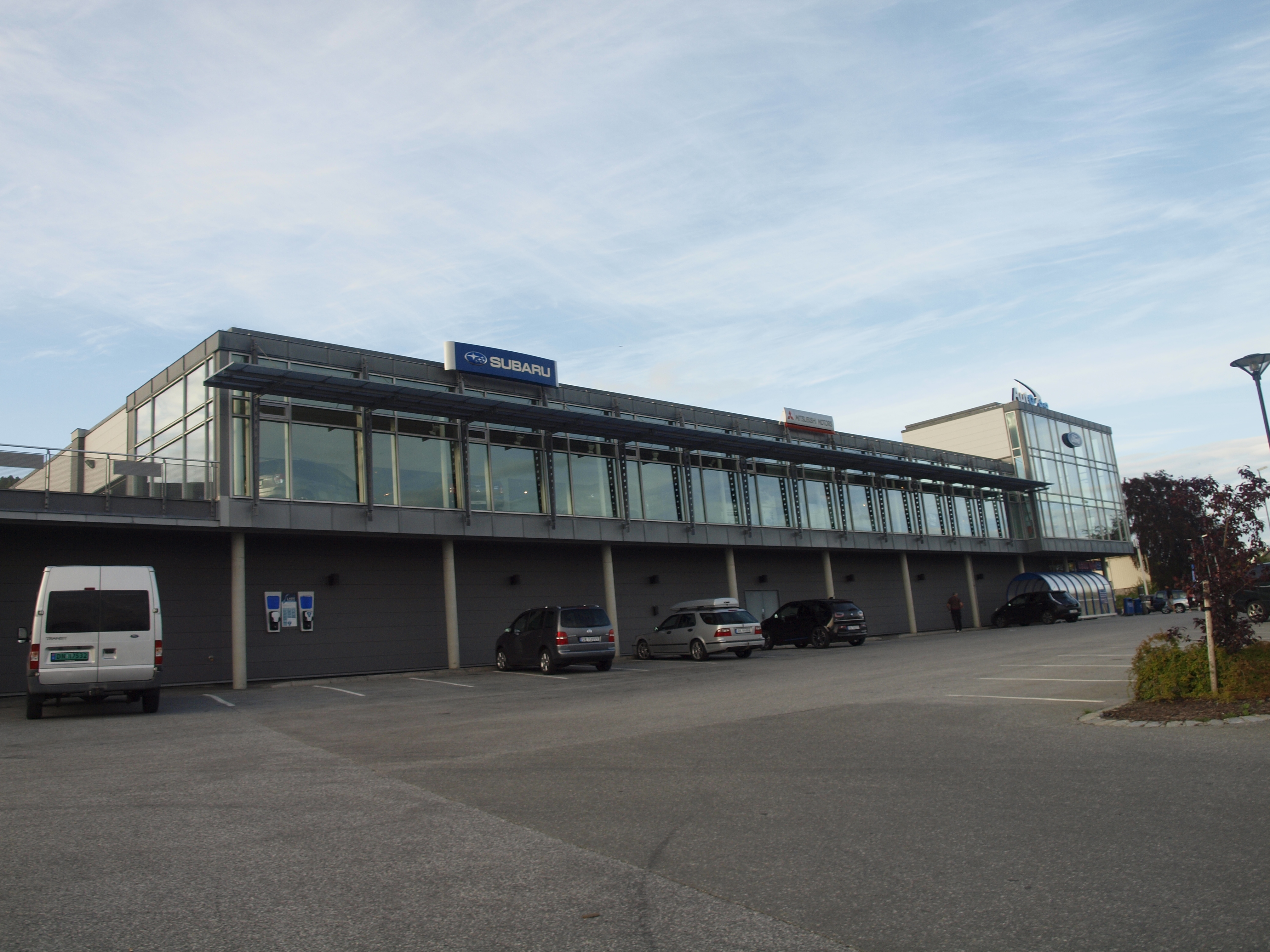 Haukebø & Rødseth in Molde, Norway